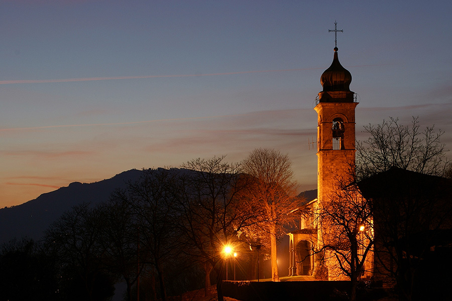 Santuario della SS. Trinità - XV secolo - Casnigo (Bg)